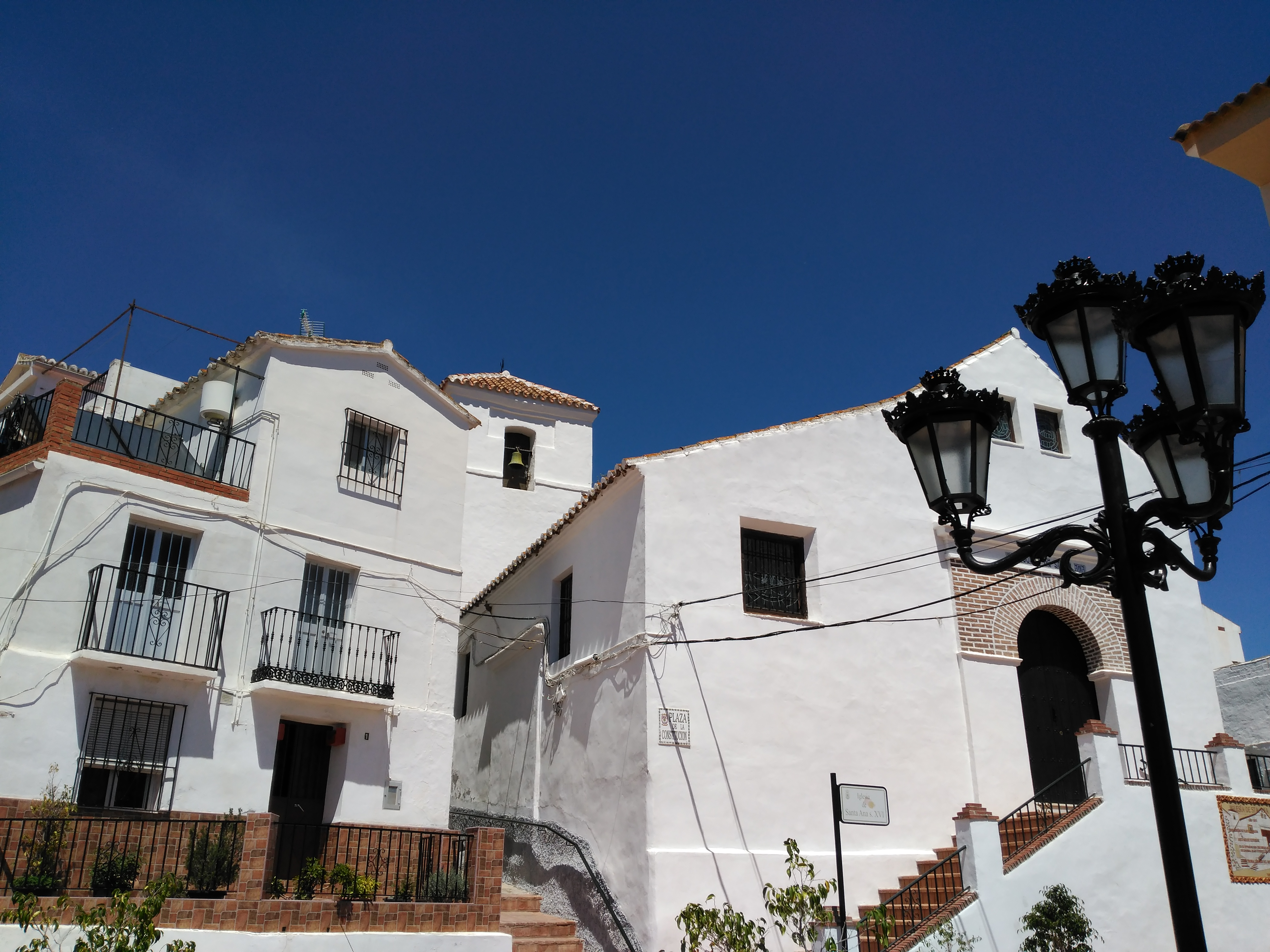 Iglesia parroquial de Santa Ana (Totalán, Málaga).